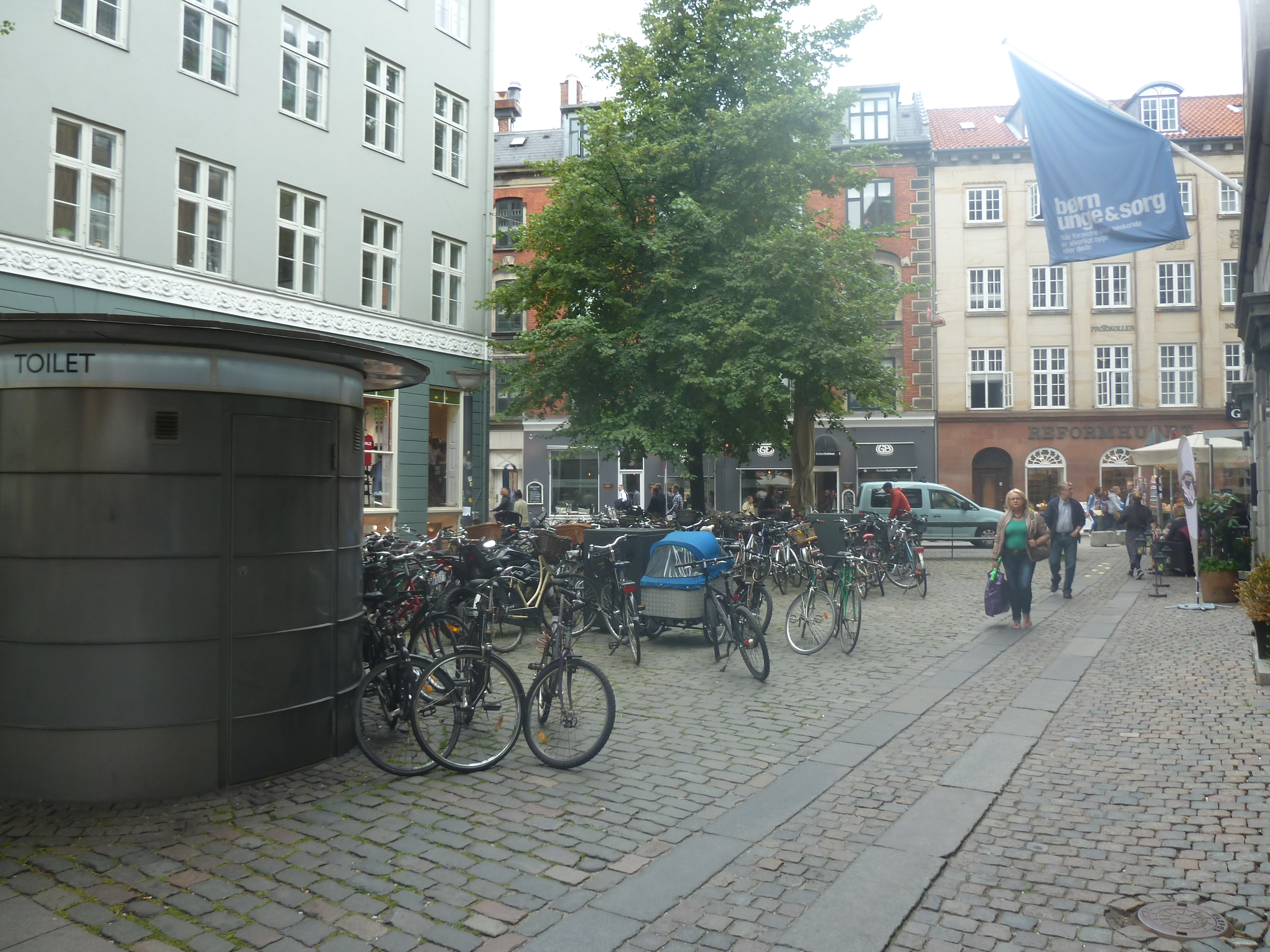 The street Kejsergade in Indre By in Copenhagen.